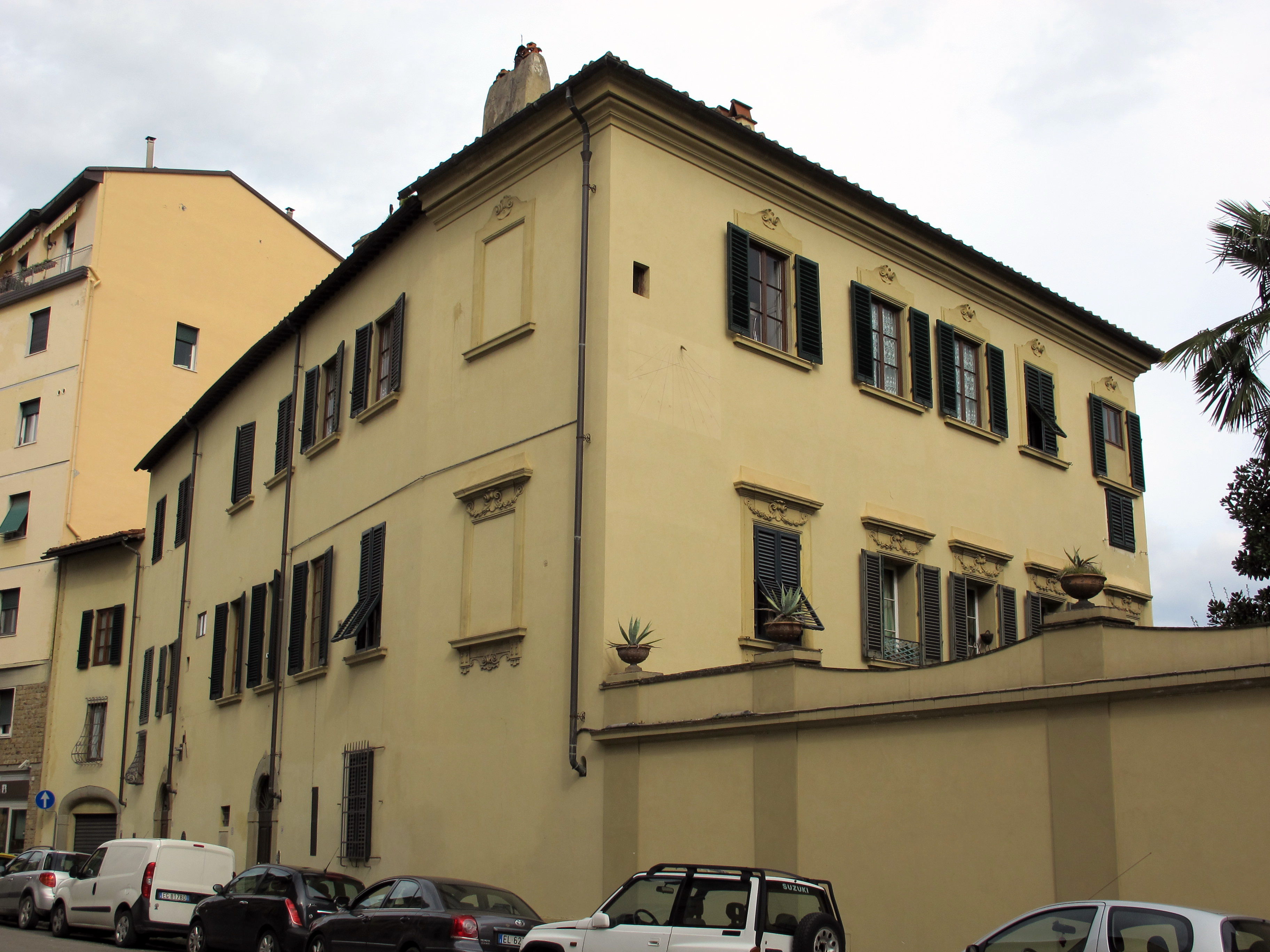 Villa la mattonaia